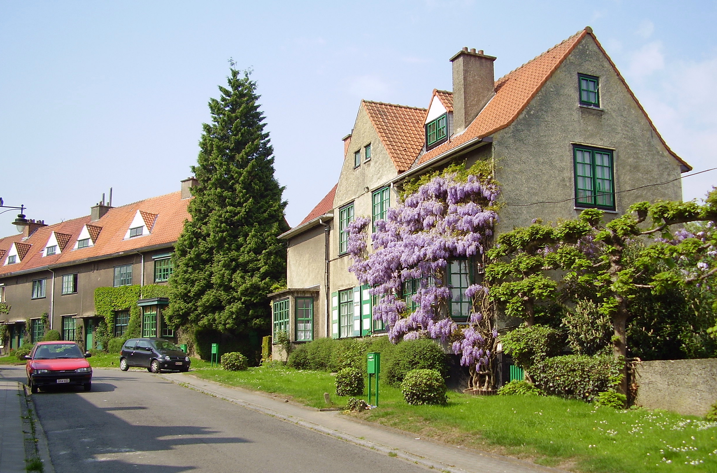 Cité-jardin Le Logis, Watermael-Boitsfort (Bruxelles)